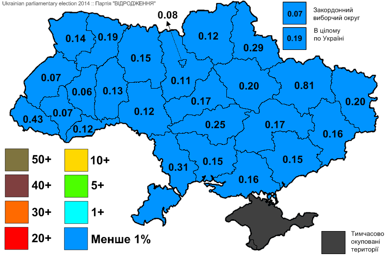 Результати виборів до Верховної Ради України, які відбулись 25 жовтня 2014 року. Інформація з офіційного сайту ЦВК. Партія "ВІДРОДЖЕННЯ".